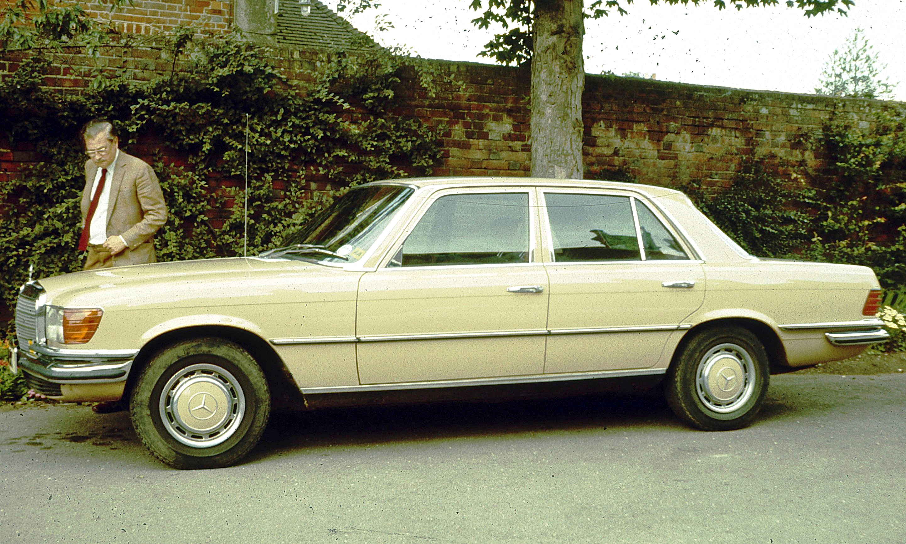 Mercedes Benz 280S W116 1972